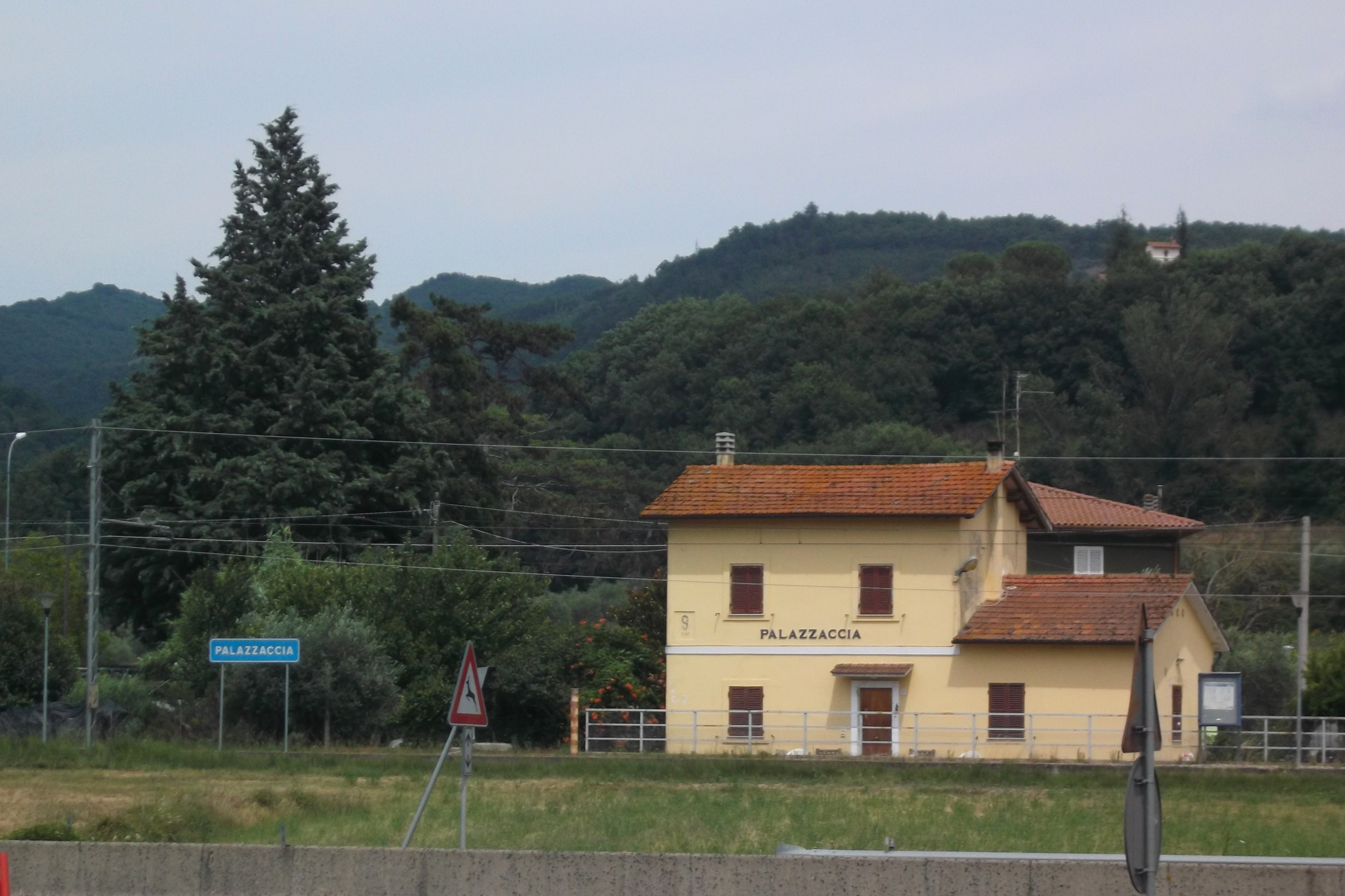 Palazzaccia train station in Perugia, Italy